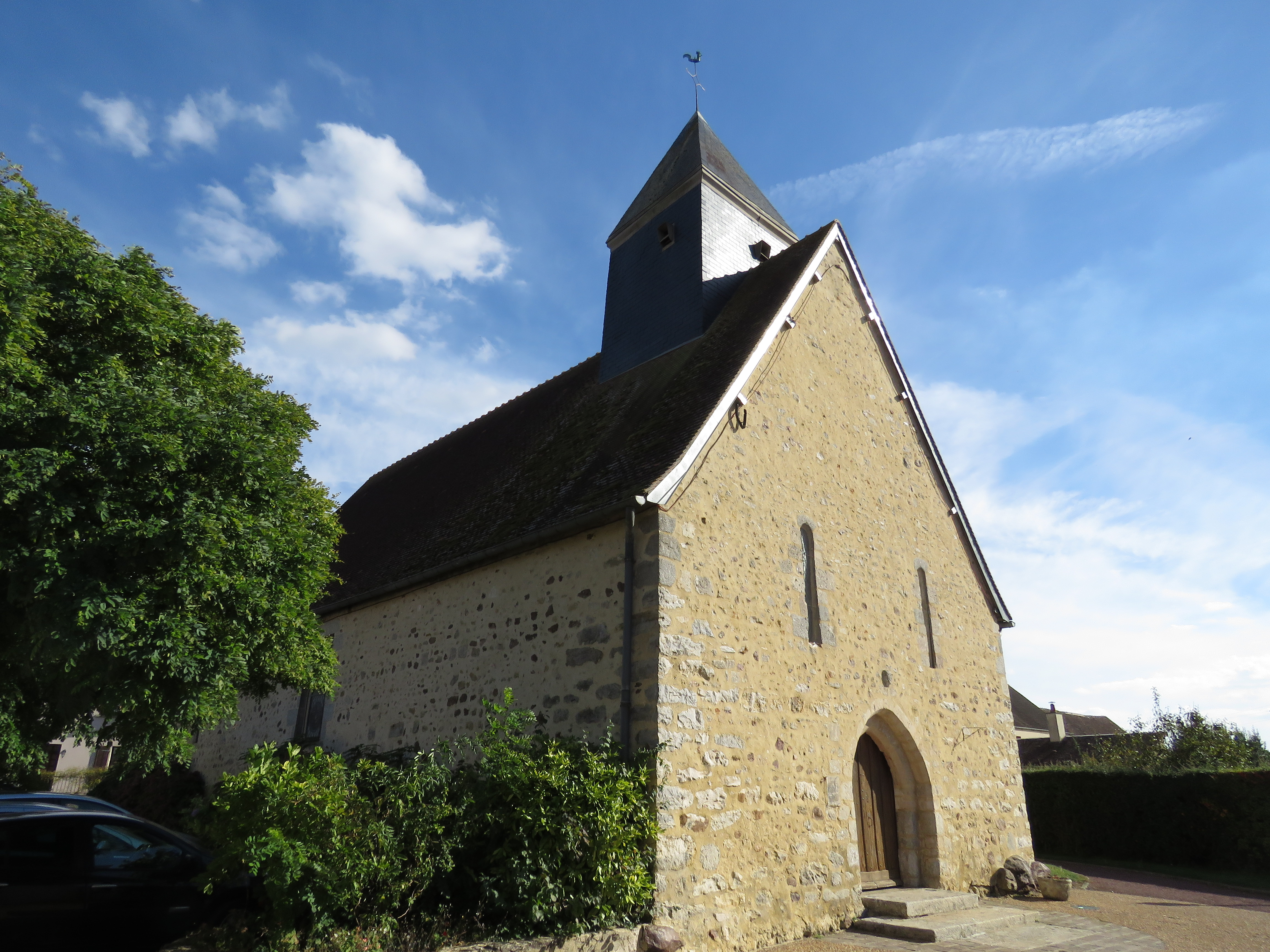 Eglise